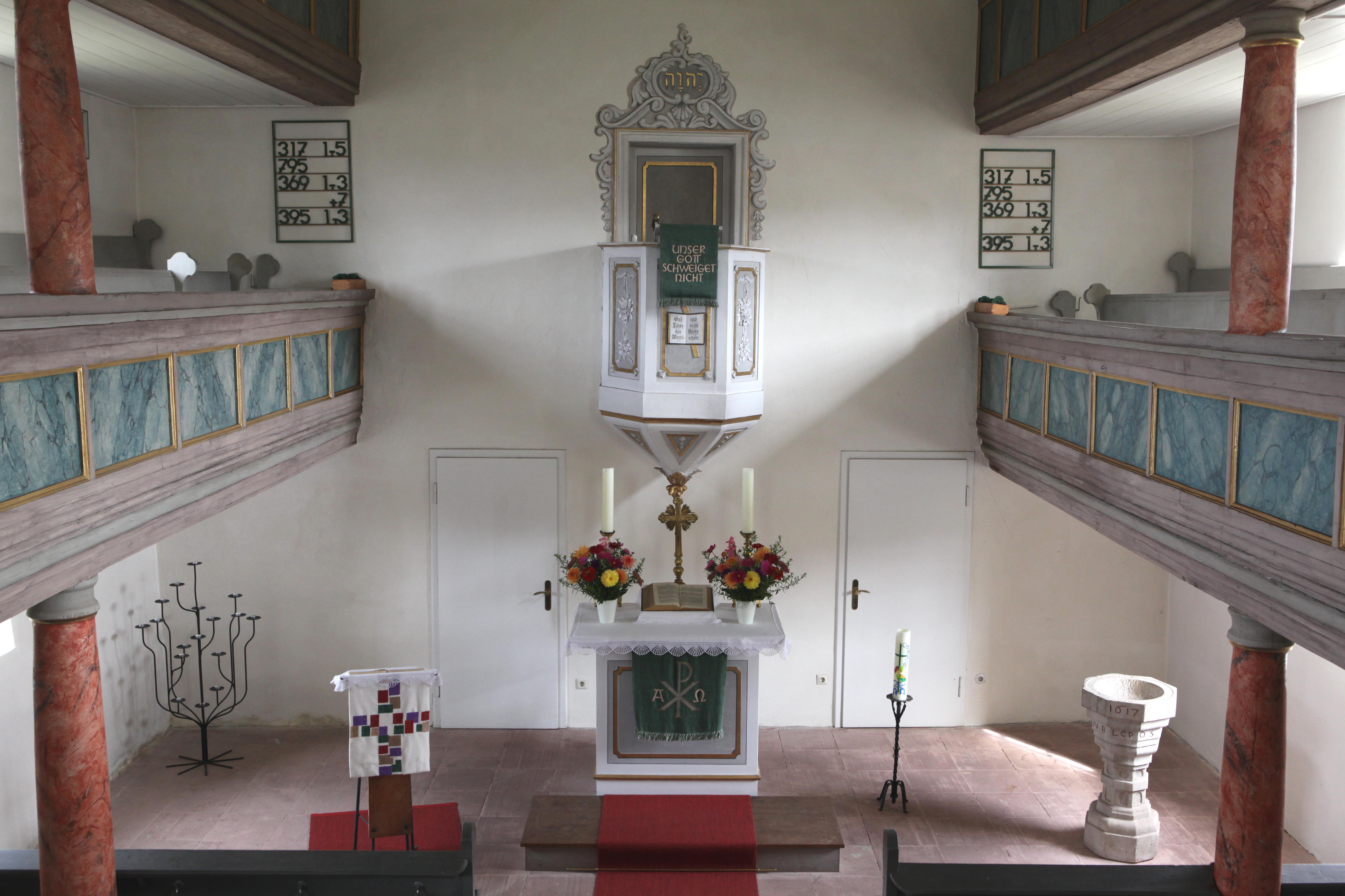 Rottenbach St. Matthäus